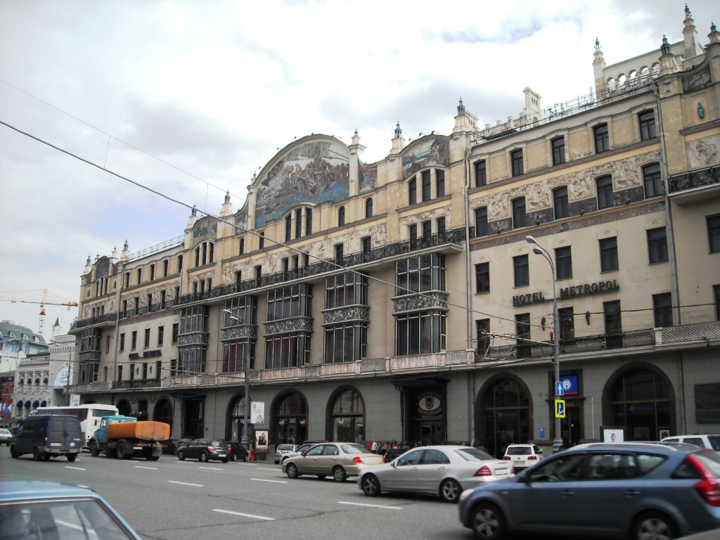 Гостиница «Метрополь» (здание 2-го Дома Советов, в котором в 1918—1919 гг. Ленин В. И. неоднократно выступал на заседаниях ВЦИК, ВСНХ и других совещаниях и конференциях) (Москва и Московская область, Москва, Театральный пр., 2 (Маркса пр., 1))